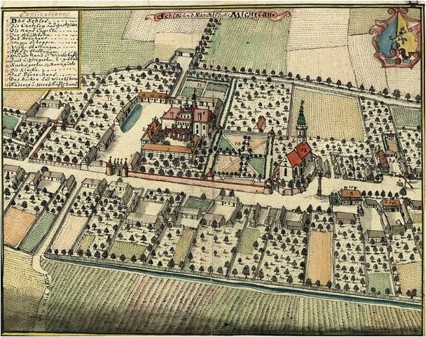 Alte Abbildung des Schlosses und Marktfleckens Michelau (heute Michałów), im Kreis Brieg (heute Brzeg im Powiat Brzeski der polnischen Woiwodschaft Opole), seit 16. Jahrhundert Besitz der Gruttschreiber von Zopekendorf